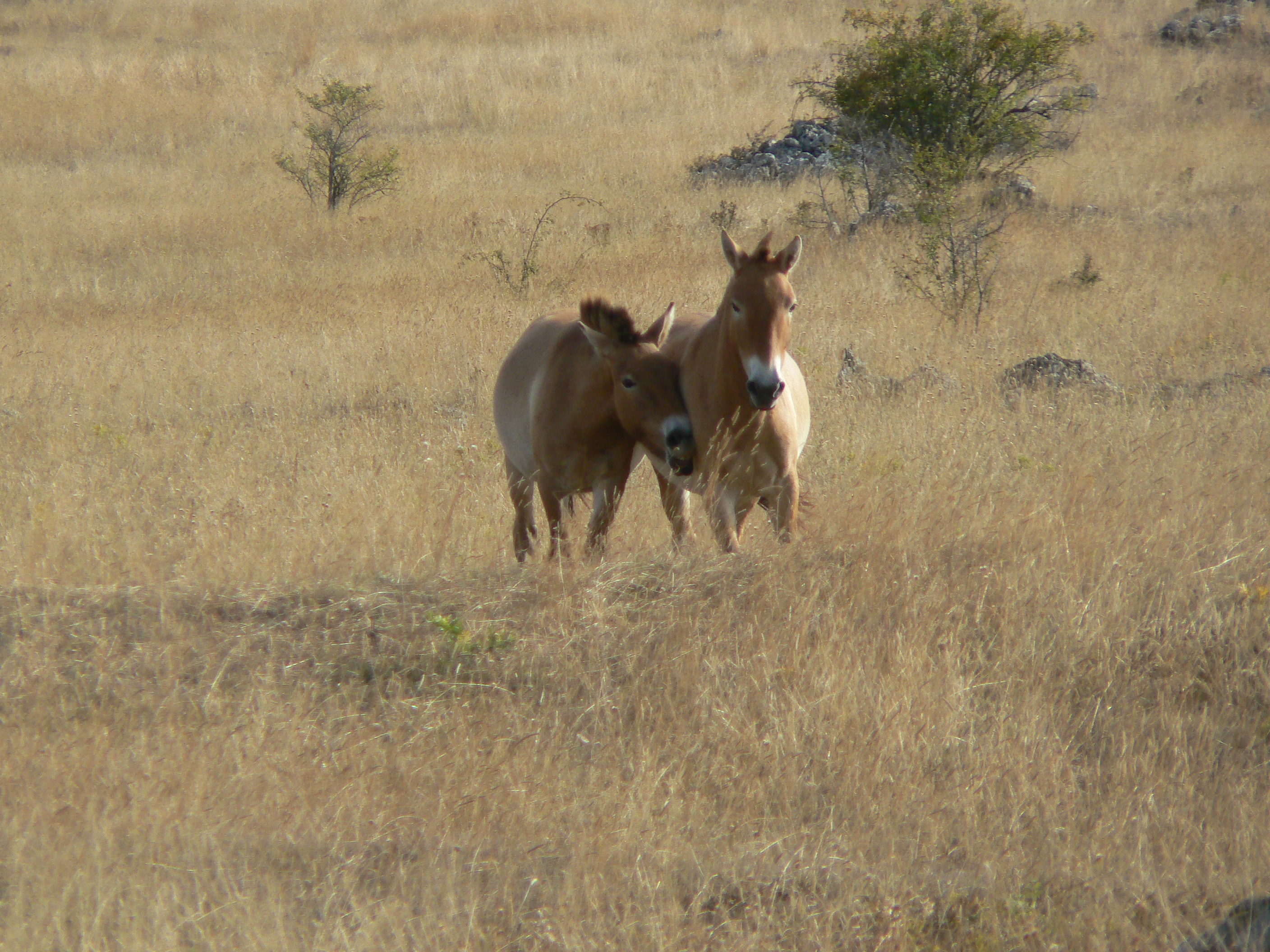 Chevaux de Przewalski sur le causse Méjean en Lozère